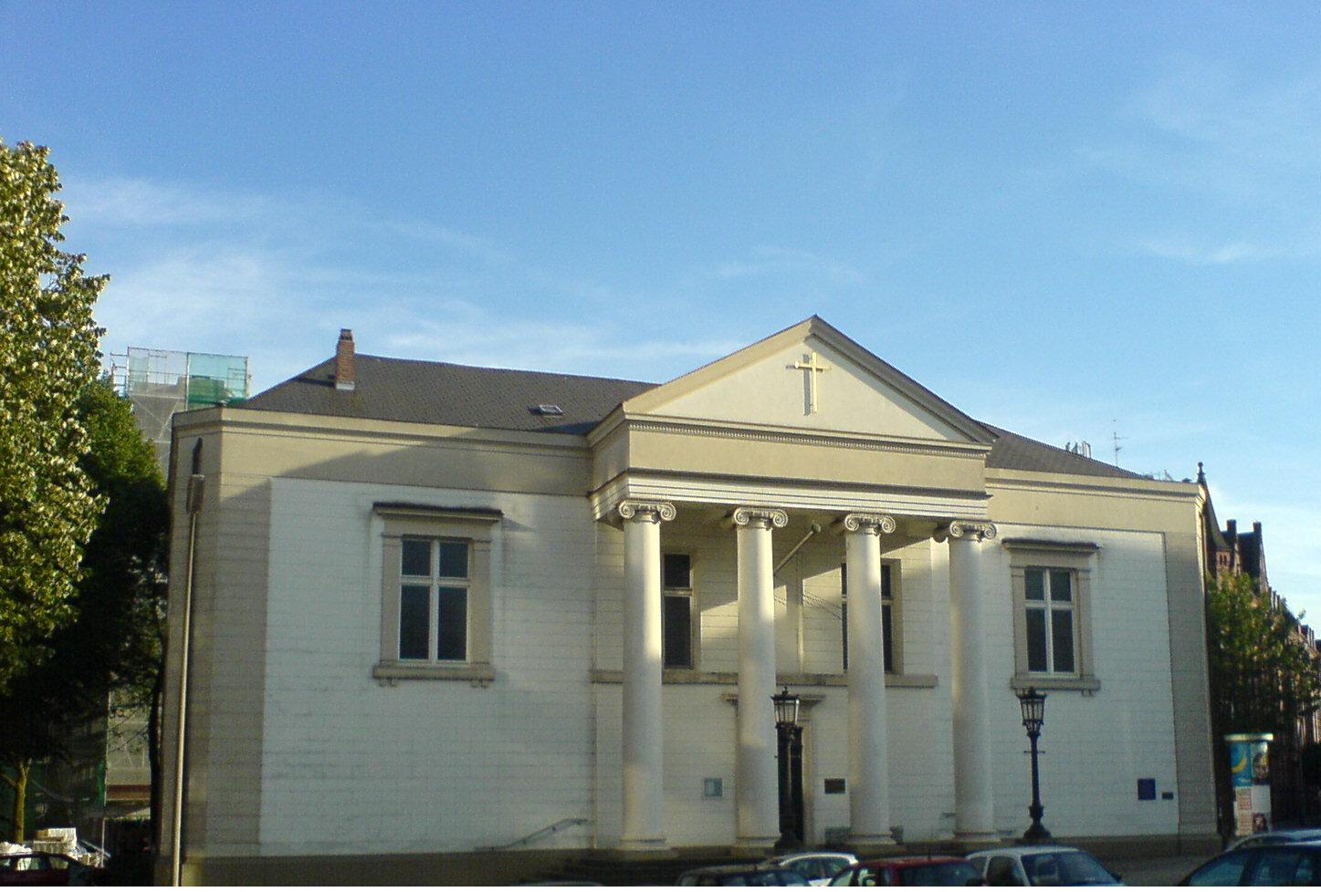 Bildbeschreibung: englische Kirche Hamburg Fotograf/Zeichner: PodracerHH 23:19, 17. Jul 2006 (CEST) Datum: 07.2006 Sonstiges: ...